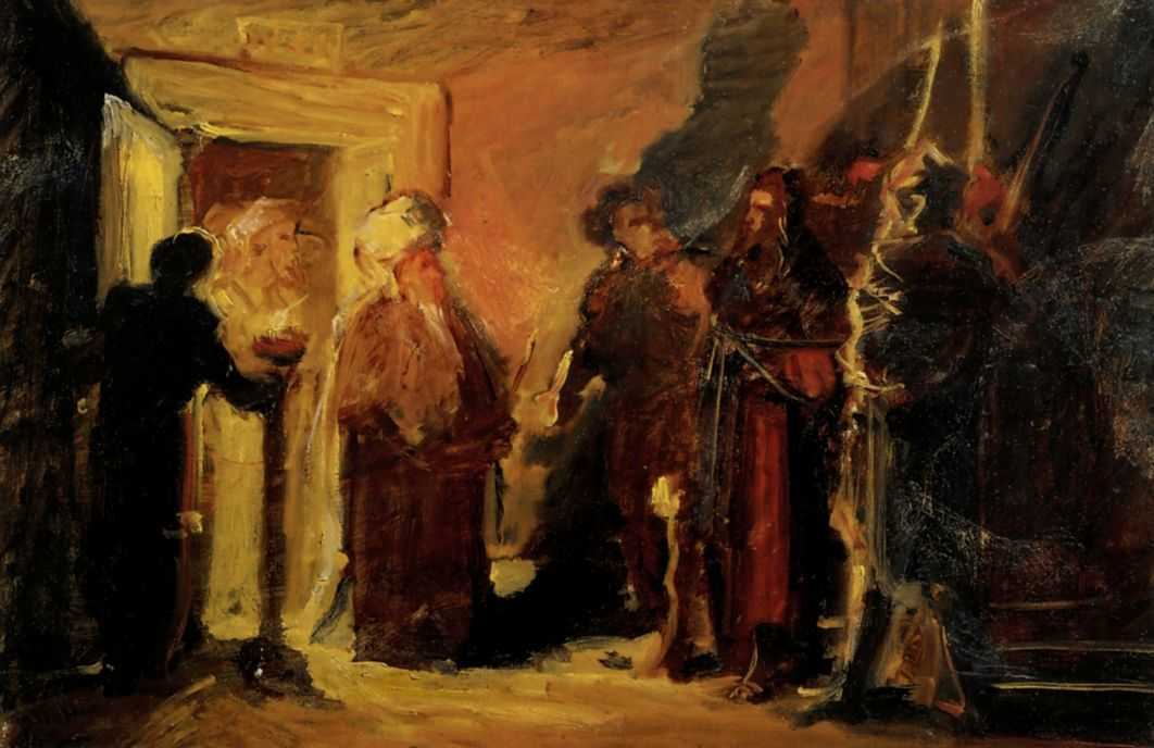 Ге Николай Николаевич. Христос перед Анной. 1868